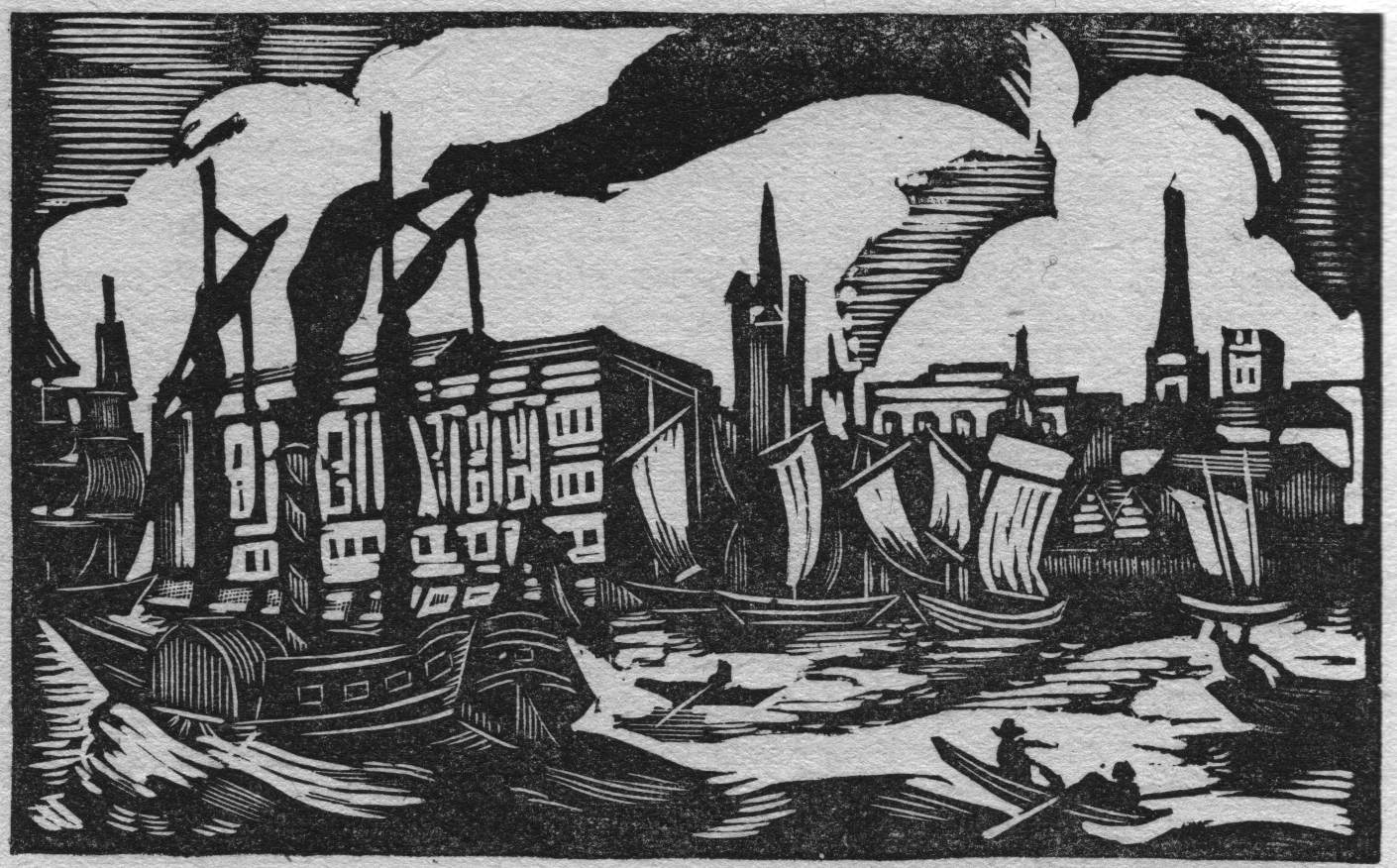 Illustration de Roger Grillon du livre Rococo de Paul Morand - bois page 80, le livre de demain, Arthème Fayard, Paris, 1947 (ré-édition de 1935)